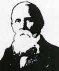 Юліан Романчук (1842—1932) — політичний провідник галицьких українців, визначний громадський та культурно-освітній діяч